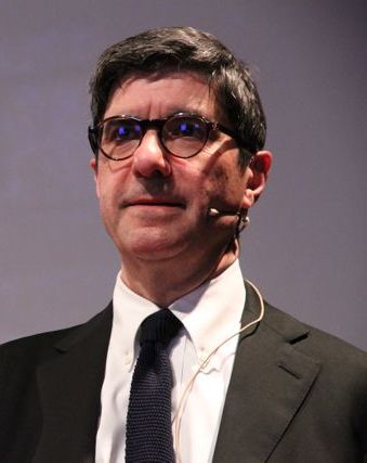 Le cose che ho imparato (Mondadori, 2011) di Gianni Riotta Come Pirandello e Vittorini, Gianni Riotta parte un giorno dalla natia Sicilia, perché "per vivere occorreva andare via". È questa la prima tappa coraggiosa di un'avventura personale e professionale ricchissima, che ha le sue radici nell' "Isola" e che lo porterà poi in paesi remoti, facendogli incrociare i protagonisti della storia del Novecento.